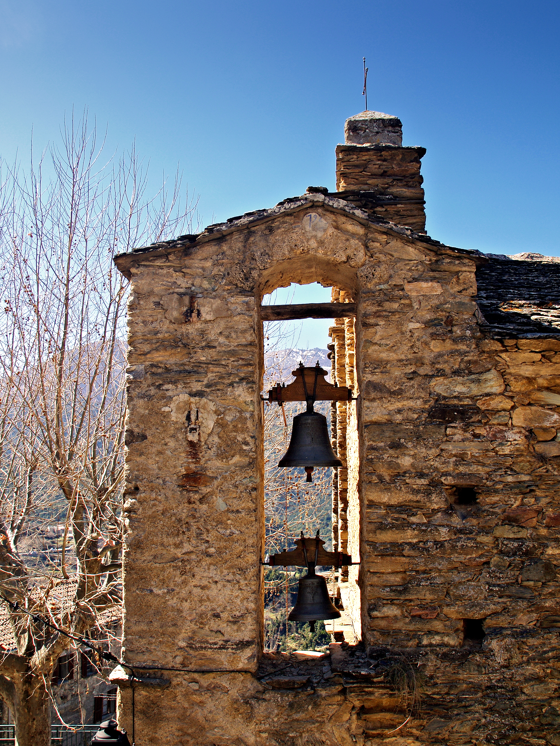 Cambia - Clocher de l'église Santa-Catalina de Loriani